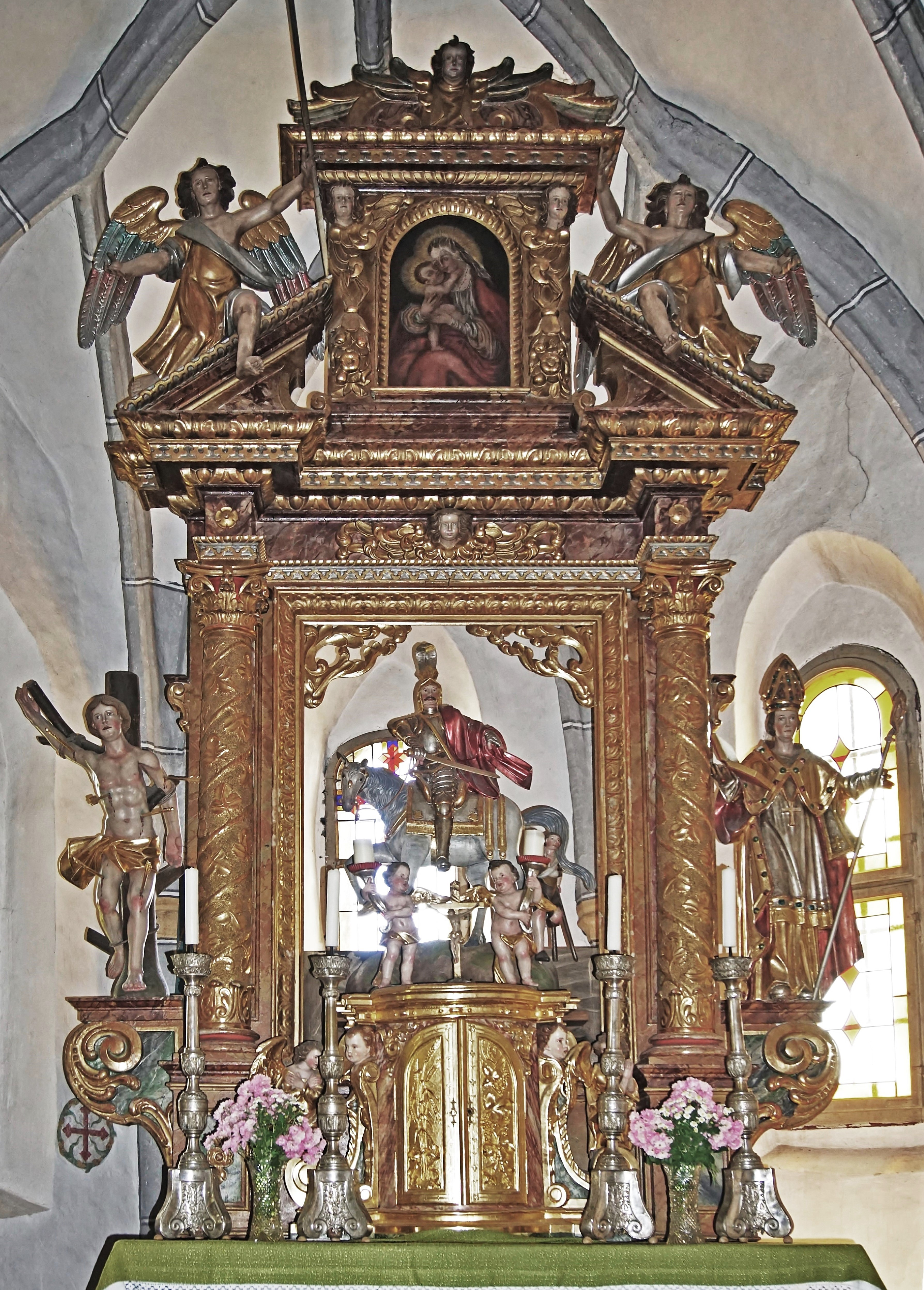 Hochaltar der kath. Filialkirche St. Martin (Feldkirchen in Kärnten)